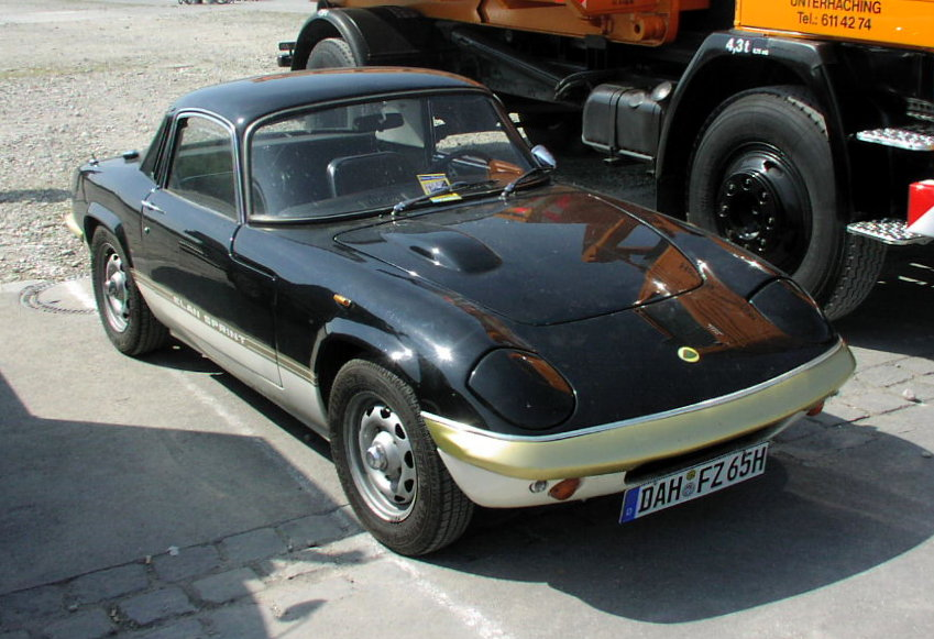 Lotus Elan